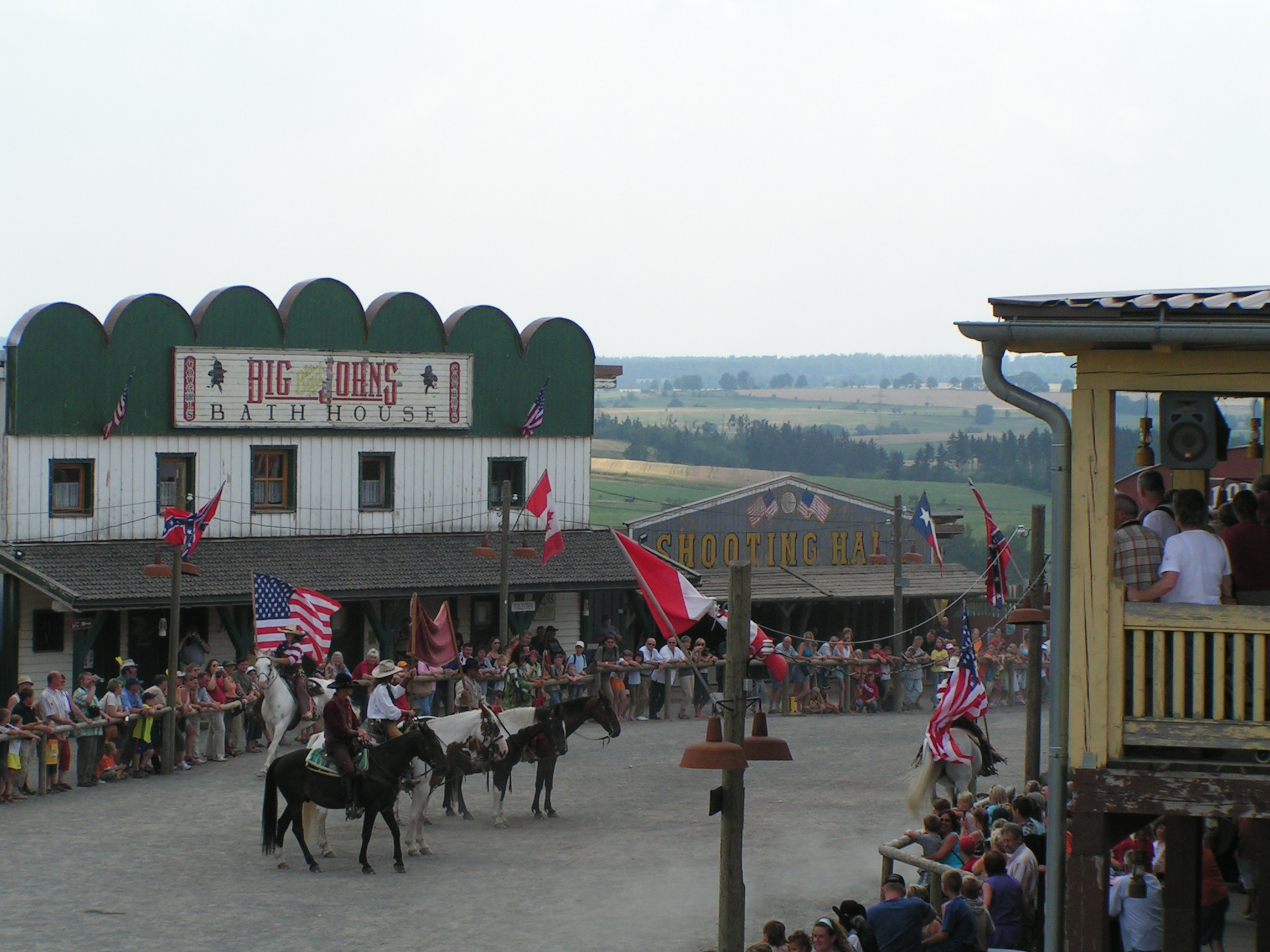 Westerndorf bei Hasselfelde